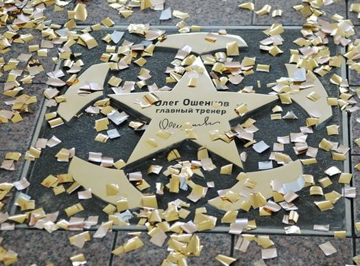 Зірка Олега Ошенкова на Алеї слави ФК Шахтар (Донецьк)